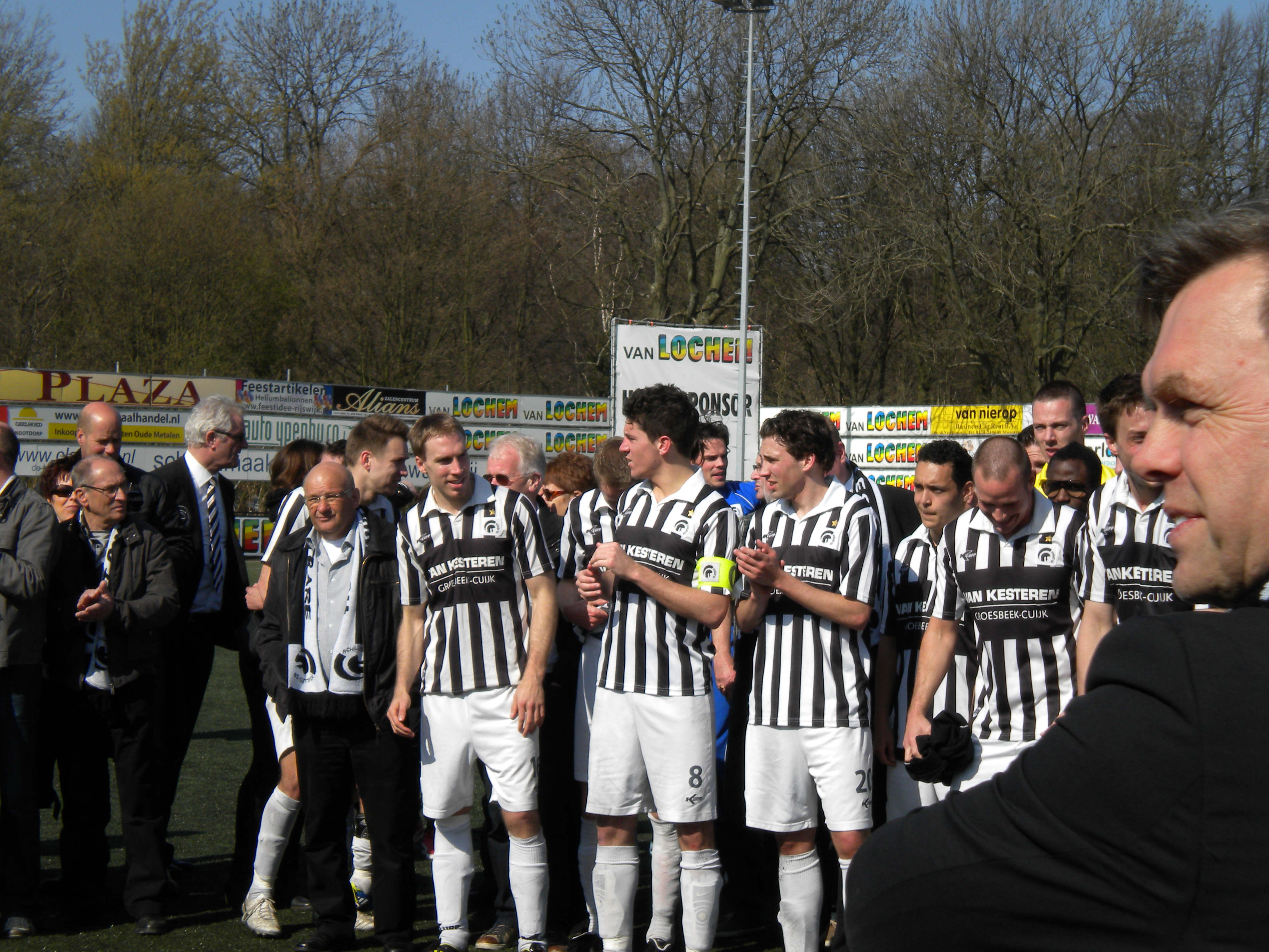 Spelers van Achilles '29 voordat de kampioensschaal werd ontvangen na het behaalde landskampioenschap in 2013. De spelers van links naar rechts: Freek Thoone, Daan Paau, Frank Hol (gebogen hoofd), aanvoerder Twan Smits, Nicky van de Groes, Levi Raja Boean, Michael Lanting, Chaimil Mormon (met bril), Tim Sanders. Op de voorgrond, rechts in beeld, is voorzitter Harrie Derks zichtbaar.